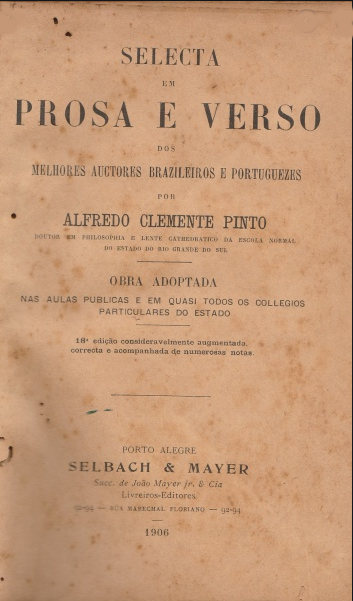 Capa da Selecta em Prosa e Verso dos melhores autores Brasileiros e Portugueses, de Alfredo Clemente Pinto.